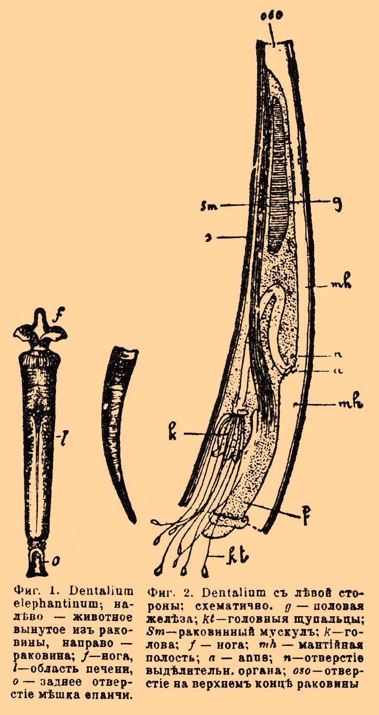 Иллюстрация к статье Scaphopoda из энциклопедии Брокгауза и Ефрона